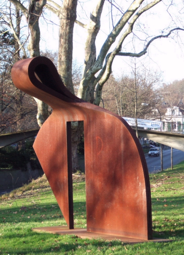 Bernhard Müller-Feyen: o.T. (1989) Material: Stahl Ort: Bonn – Stadtpark Bad Godesberg